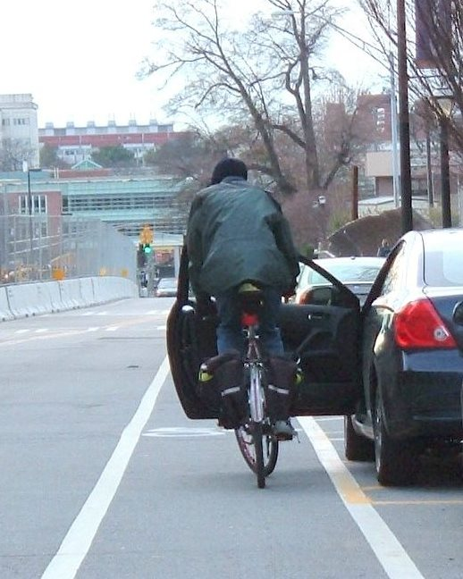 Illustration for door zone.